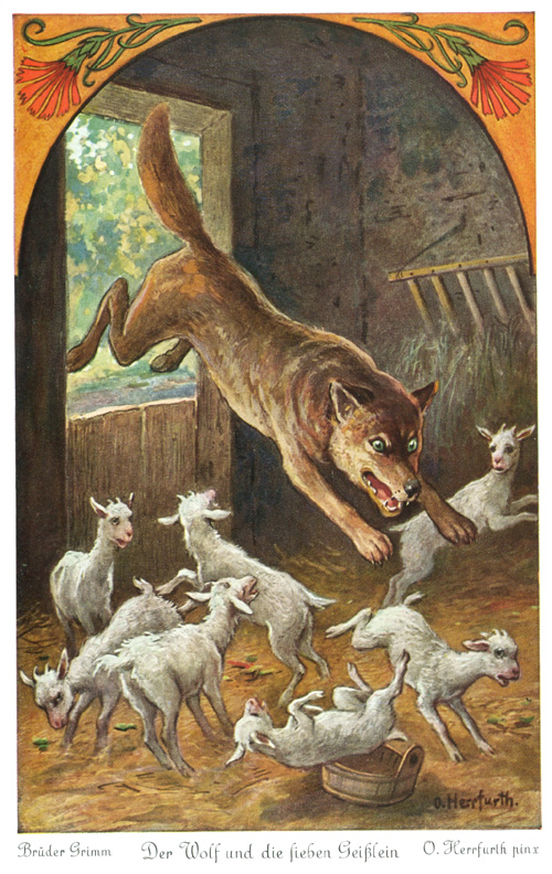 Der Wolf und die sieben Geißlein. Postkartenserie nach dem Märchen. Serie von sechs Postkarten der Firma Uvachrom. Serie 265, Nr. 4518 Text der Rückseite: Der schlaue Wolf hatte nun seine Stimme mit Kreide geschmiert und kam wieder zum Geißenhaus. Da ließen sich die sieben Geißlein täuschen und machten die Türe auf. Mit einem Satz sprang der Wolf hinein. Die Kleinen wollten sich verstecken, aber der Wolf verschlang eins ums andere. Nur das Jüngste fand ein sicheres Versteck.